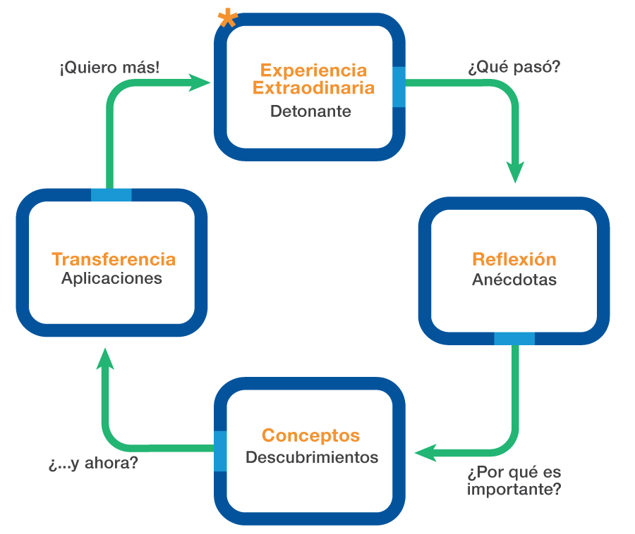 Modelo básico de educación experiencial para la construcción de equipos.